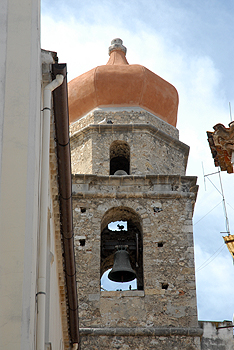 Rodi Garganico, chiesa parrocchiale di San Nicola di Mira: il campanile, dettaglio della cella campanaria.